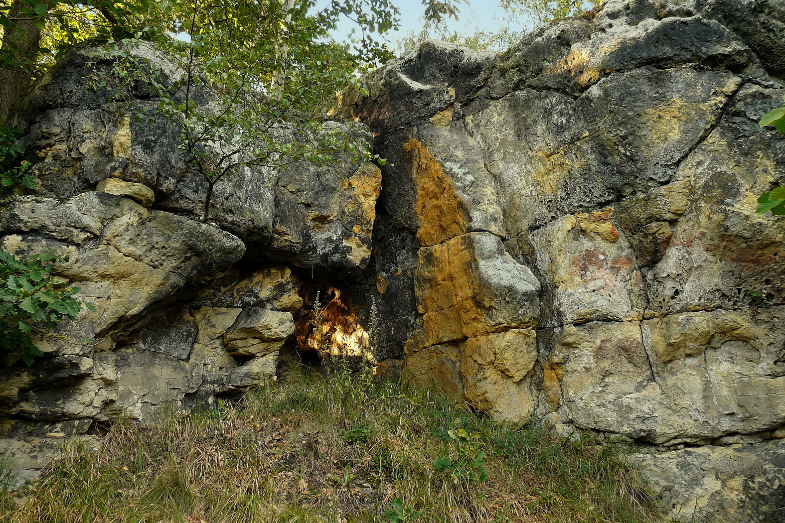 Skály na Zadním Hrádku.